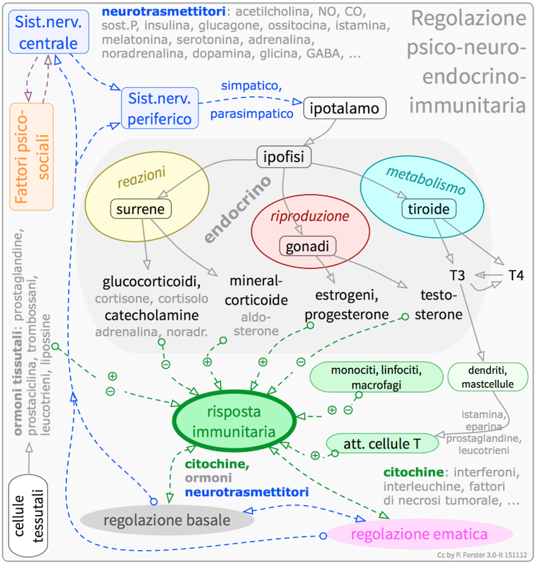 Regolazione psico-neuro-endocrino-immunitaria: sistemi nervosi, endocrini, immunitari. Neurotrasmettitori, ormoni, ormoni tissutali, citochine, mediatori immunitari